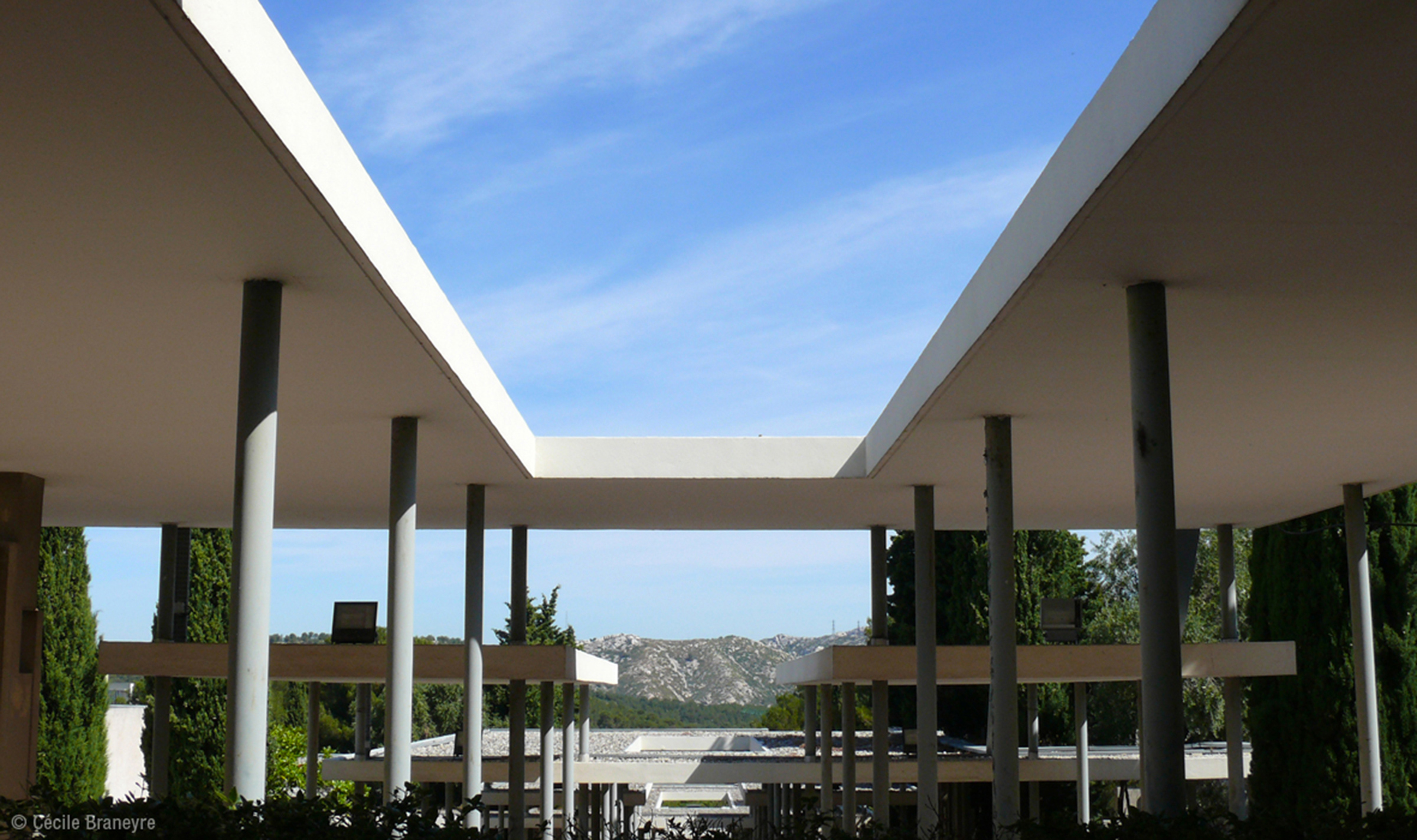 "Pas d'âne" de l'ESADMM qui dessert les ateliers de l'école en restanque.